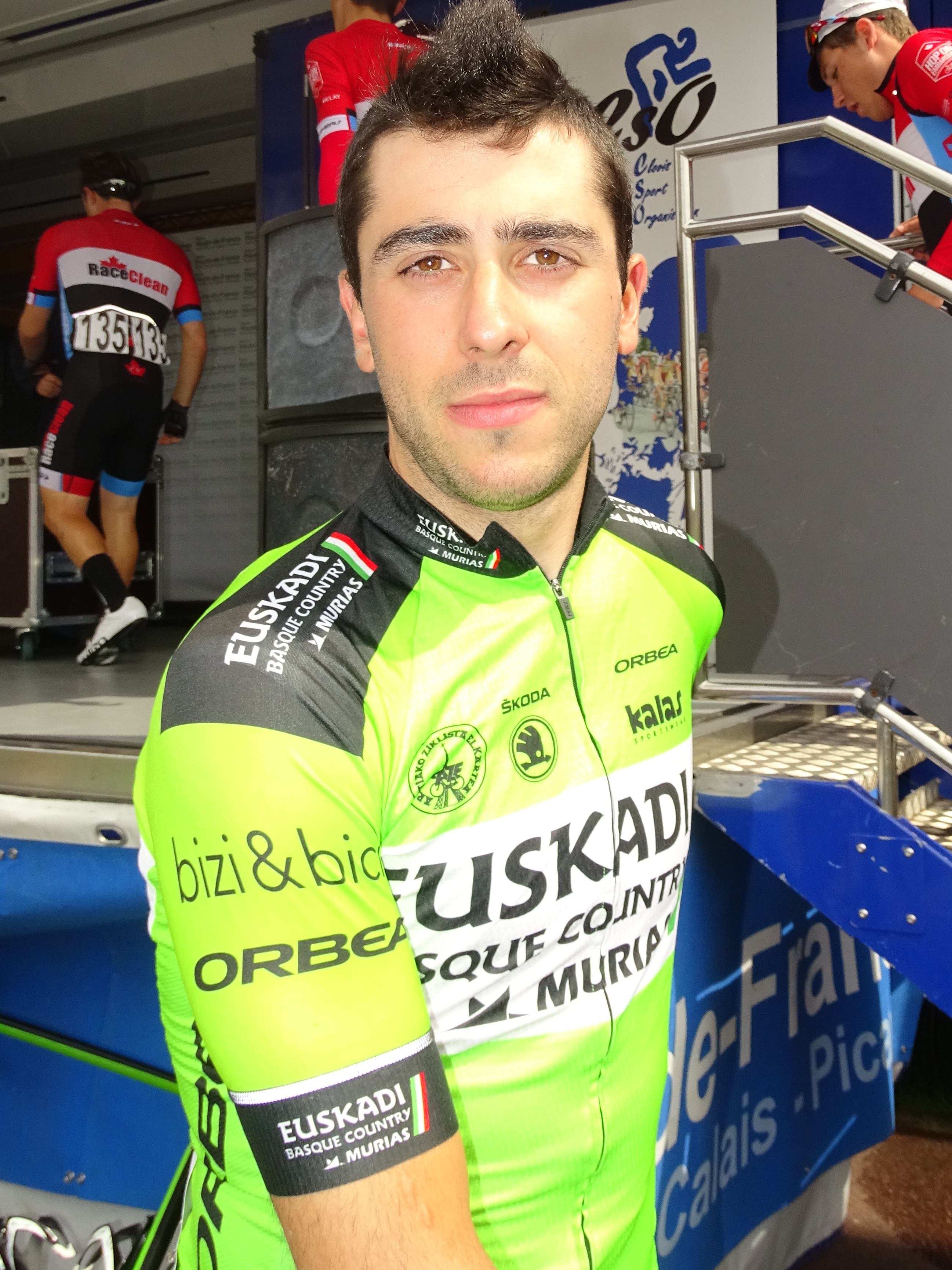 Reportage réalisé le vendredi 20 mai 2016 à l'occasion du départ de la première étape du Paris-Arras Tour 2016 à Douchy-les-Mines, Nord, Nord-Pas-de-Calais-Picardie, France.